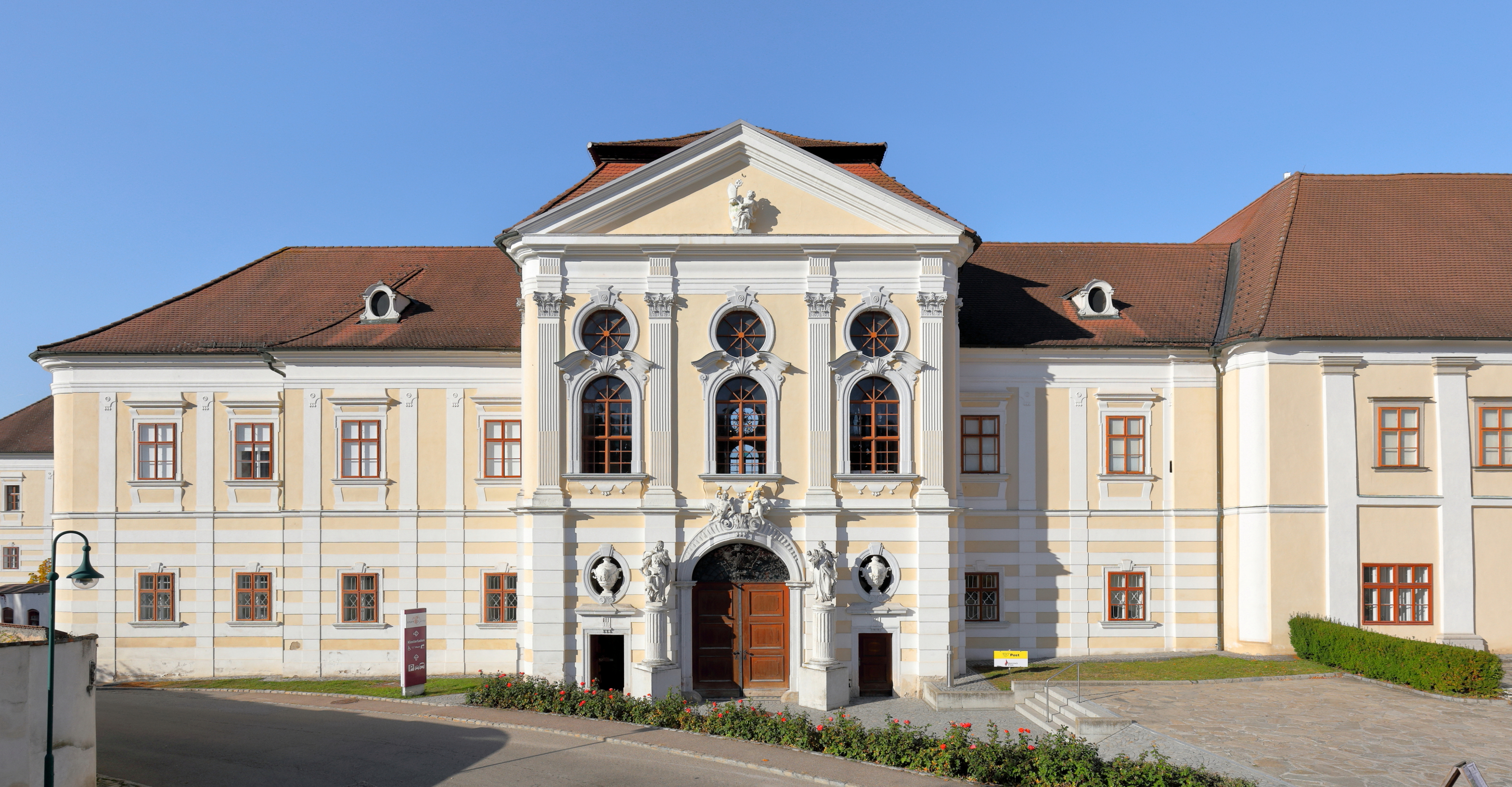 Das „Neugebäude“ des Prämonstratenser-Chorherrenstiftes in der niederösterreichischen Stadt Geras. Ein barocker Bau mit einer dem Ort zugewandten Hauptfassade und einem überhöhten Torpavillon mit Einfahrt. Er wurde von 1736 bis 1740 nach Plänen und unter Aufsicht von Joseph Munggenast errichtet.